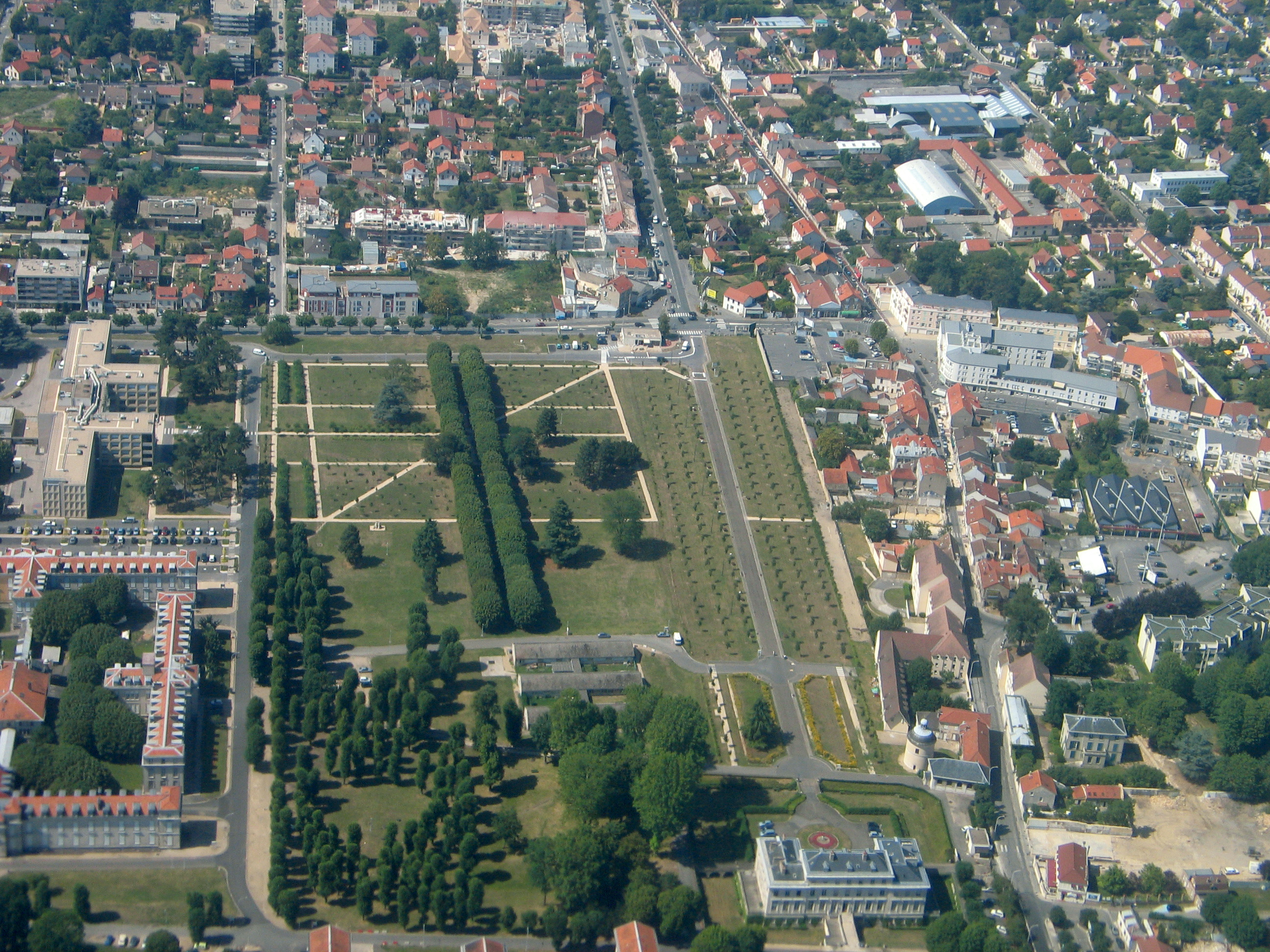 L'hopital Emile-Roux à Limeil-Brévanne vu d'avion